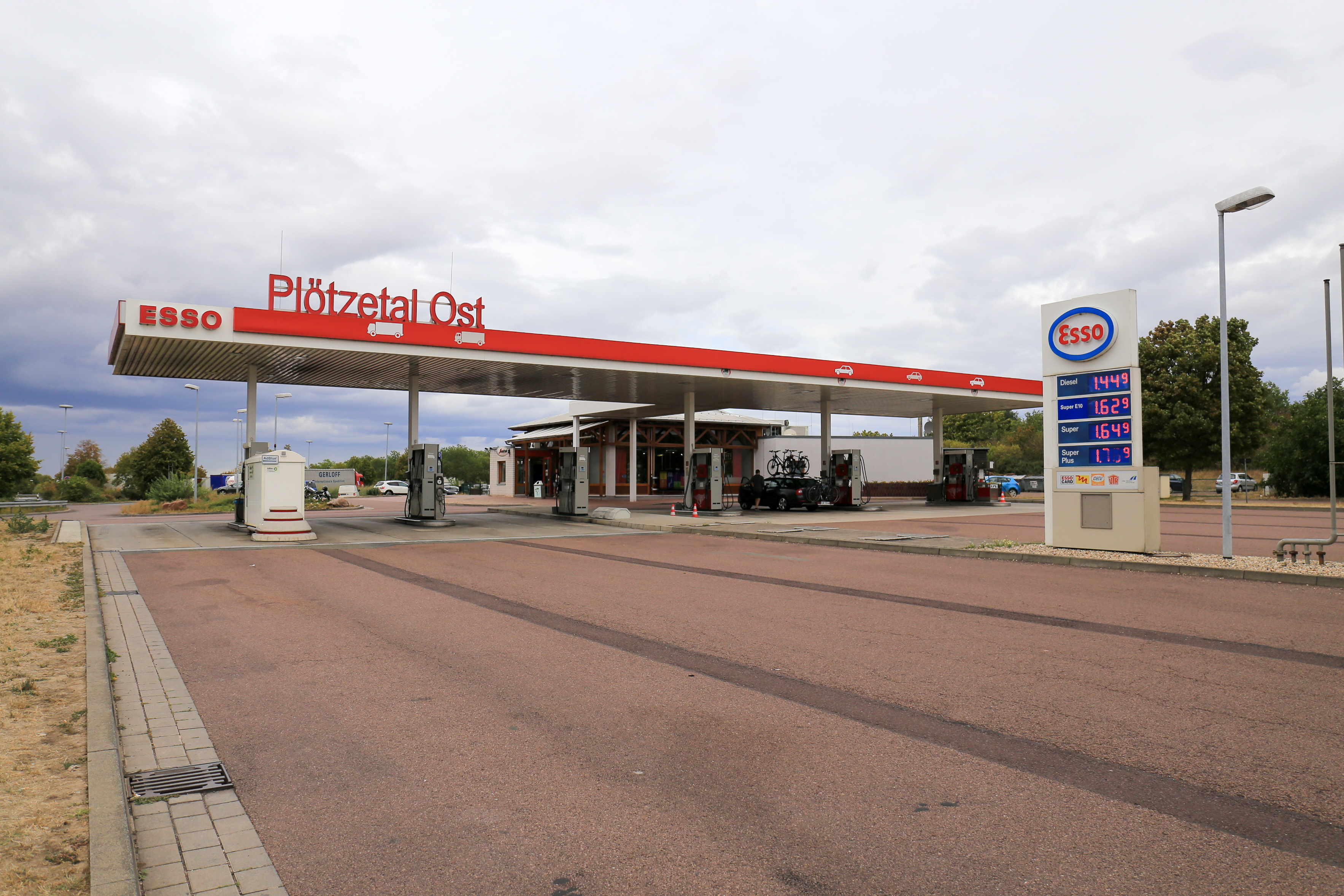 Die Bundesautobahn 14.